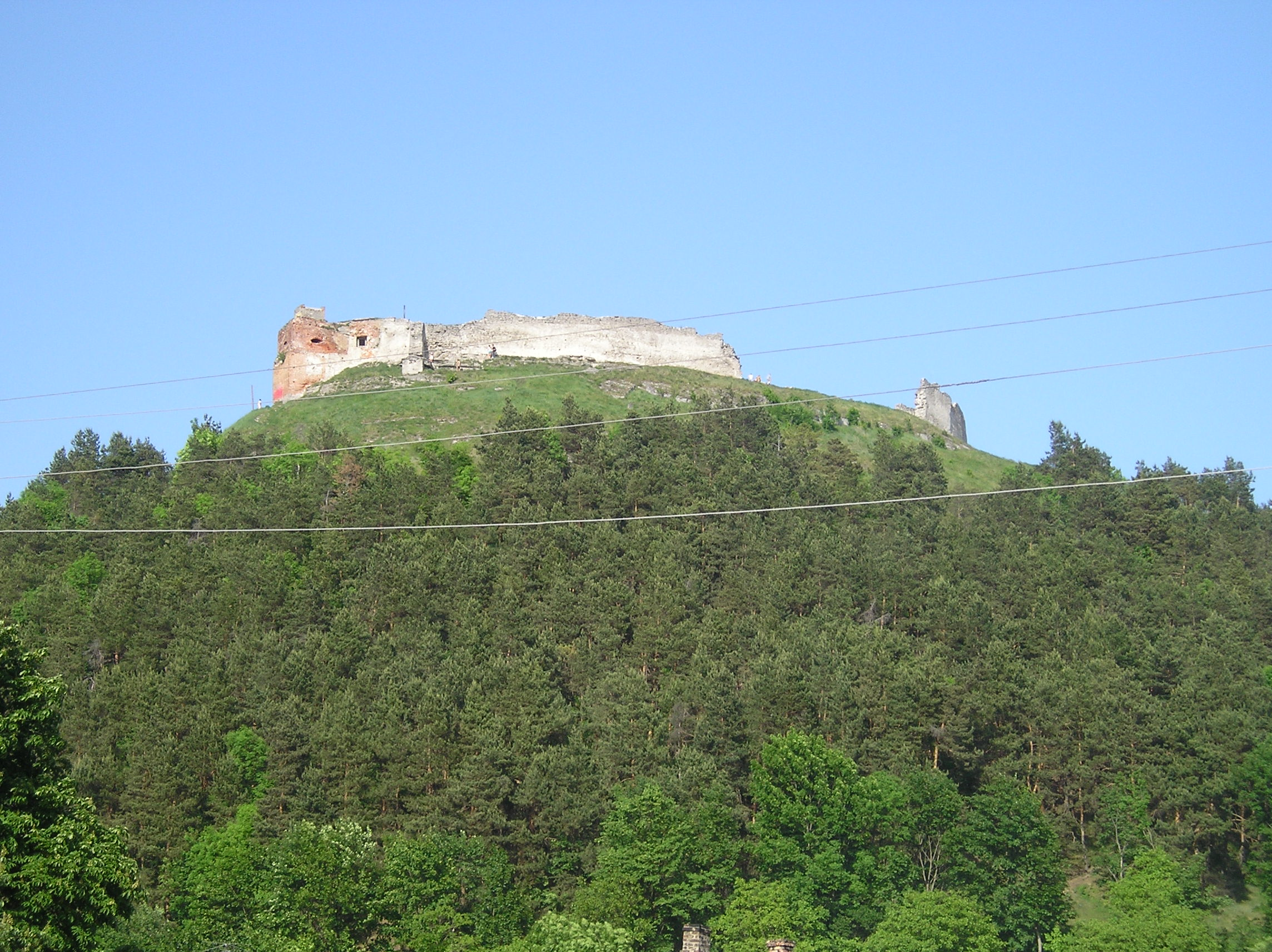 Ruiny zamku